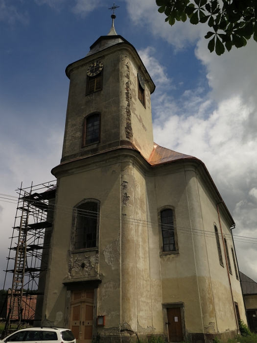 Kostel Nejsvětější Trojice, Roprachtice.